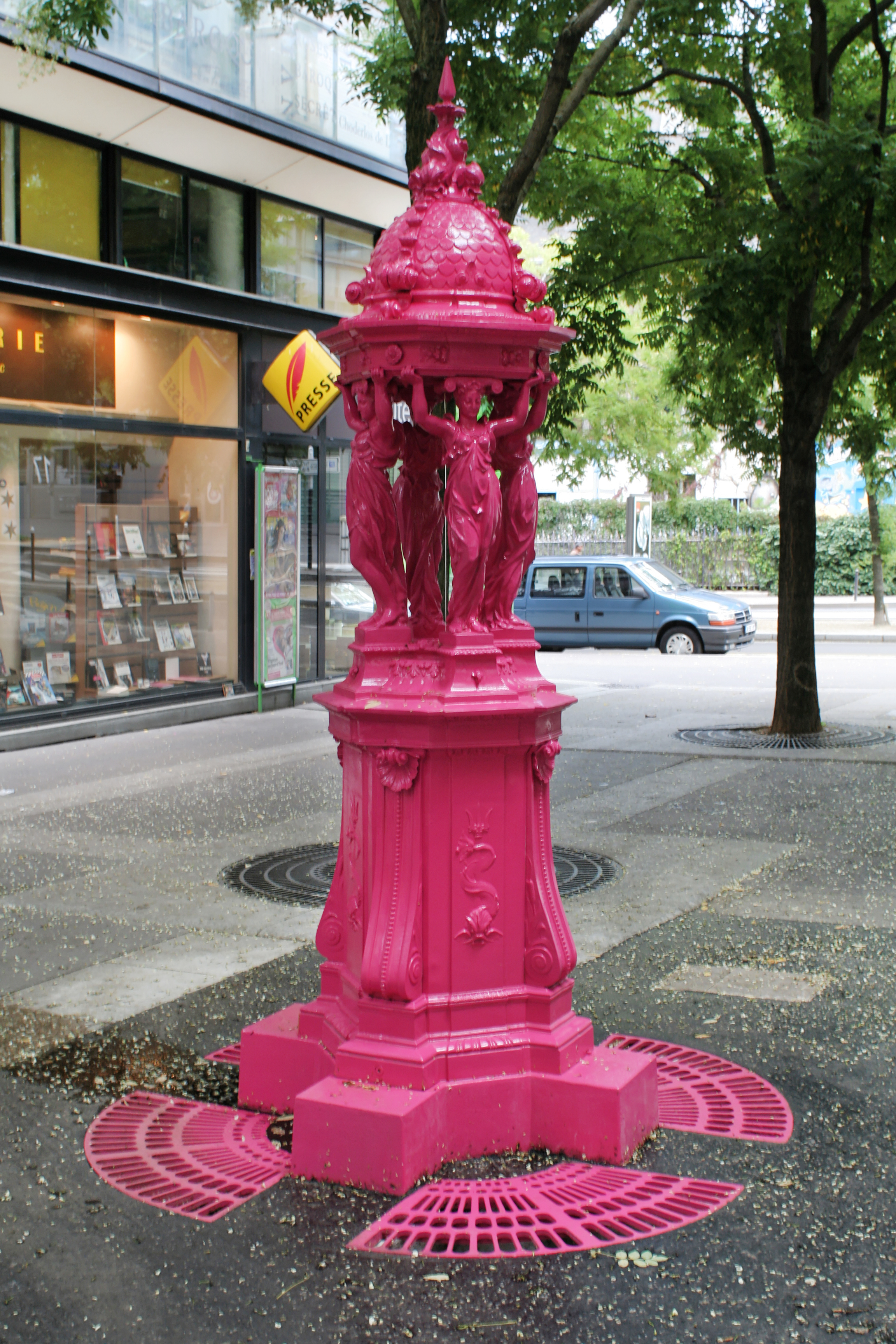 Fontaine Wallace de la rue Jean-Anouilh.